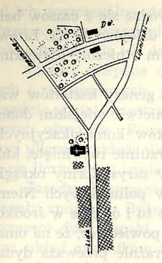 Беларуская (тарашкевіца): Тракелі (Trakieli). Плян мястэчка